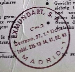 Tampon de la société Exmundart d'Isidro Clot